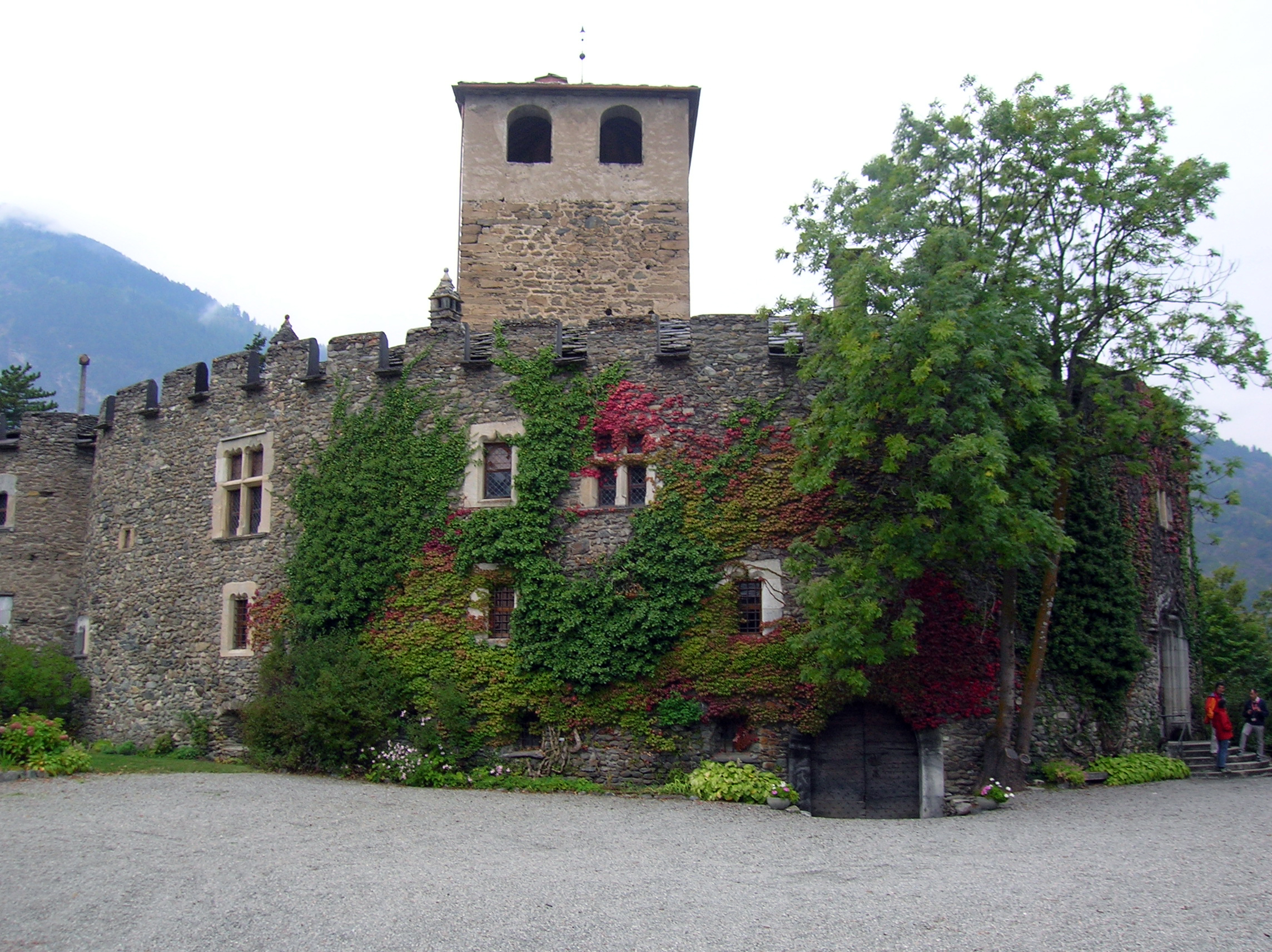 Castello di Introd Giornate del Patrimonio europeo 2012. Introd, Valle d'Aosta, Italia. This is a photo of a monument which is part of cultural heritage of Italy.